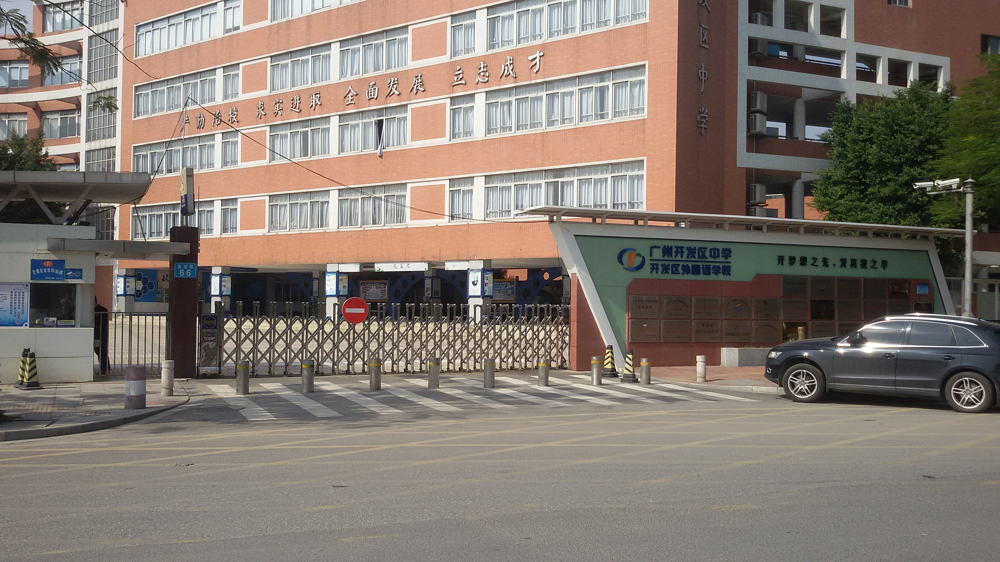 粵語: 廣州開發區中學嘅正門